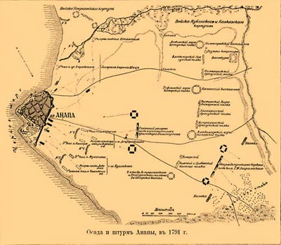 Anapa1791